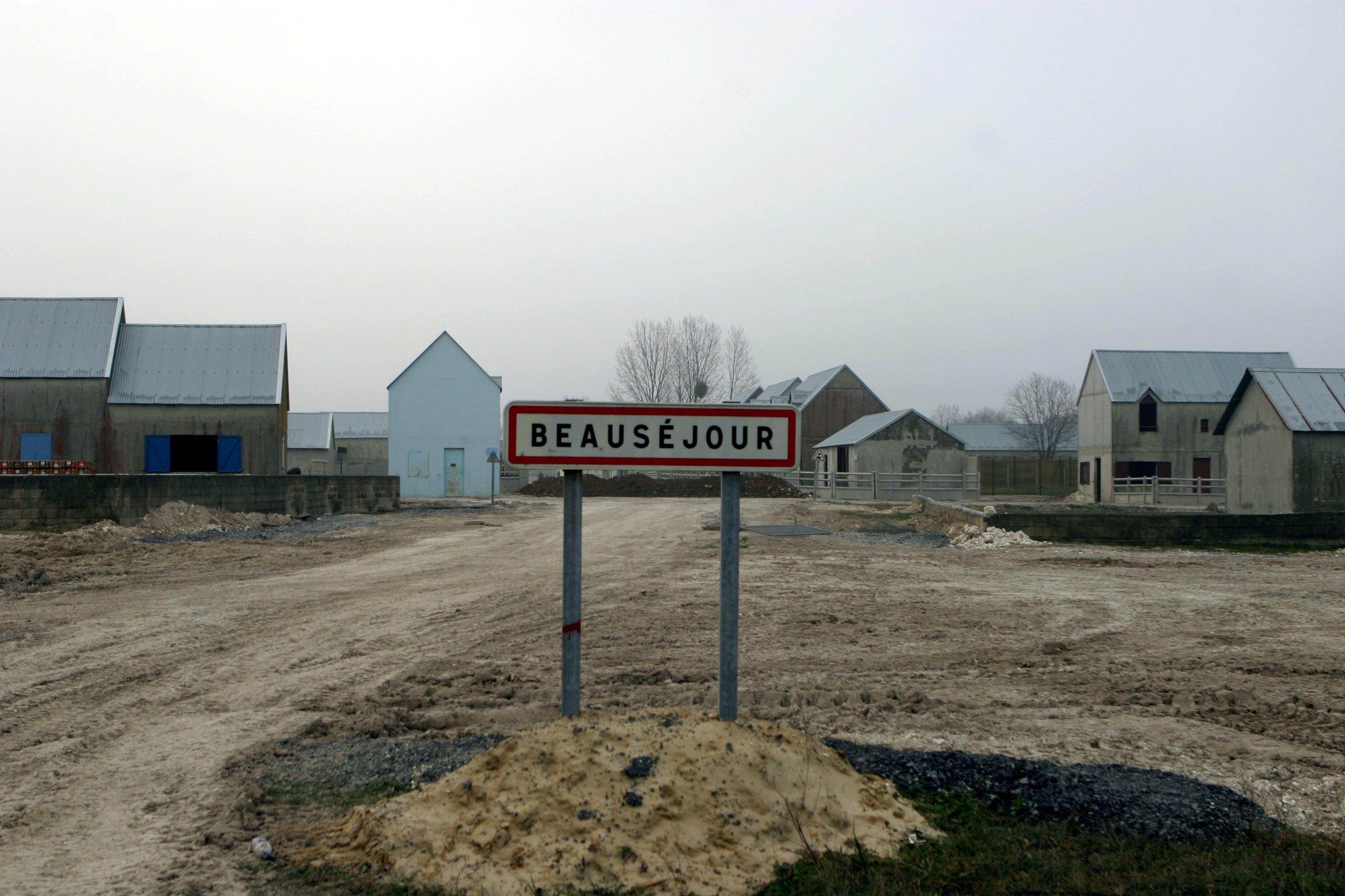 Photo du village de combat de Beauséjour au Centre d'entraînement au combat en zone urbaine de Sissonne en France